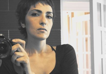 Amal Kenawy , date non connue